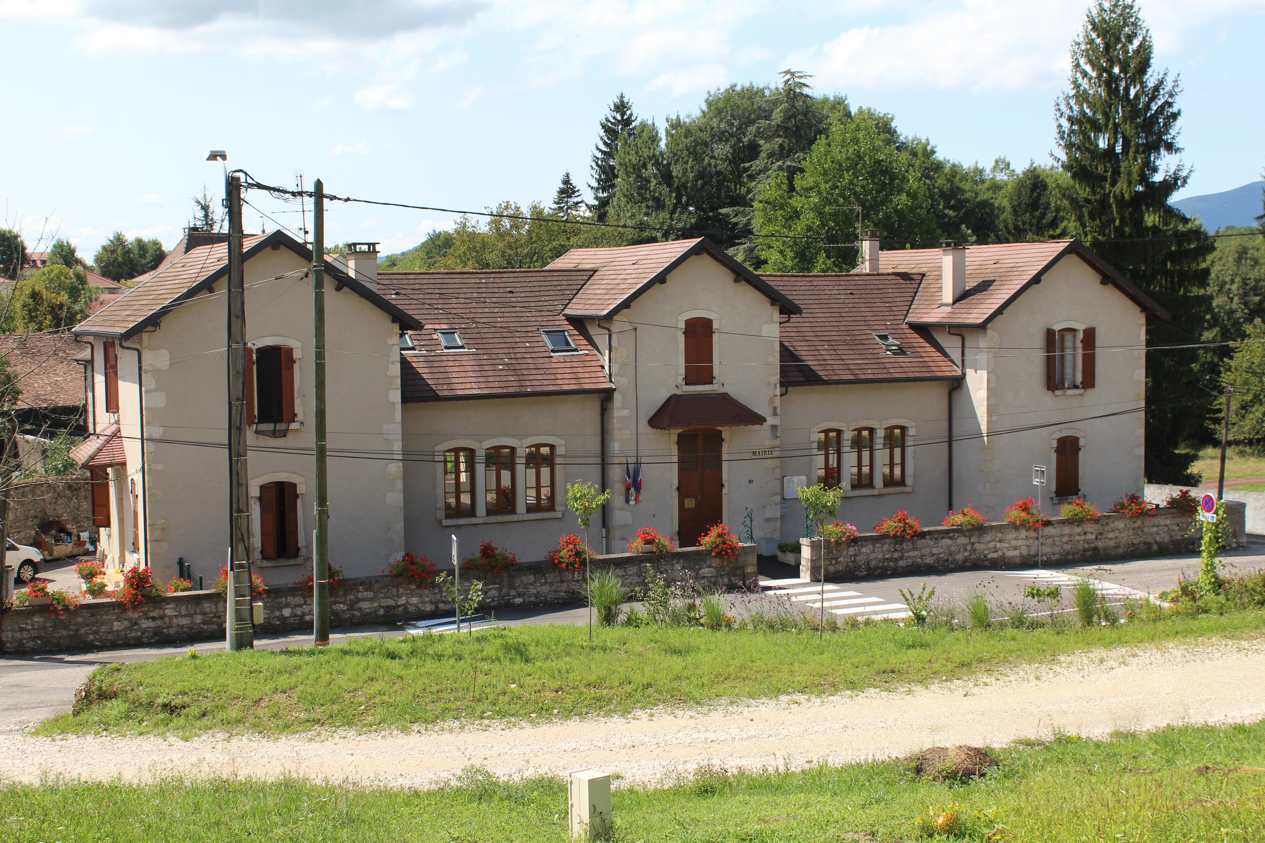 Mairie de Magnieu.